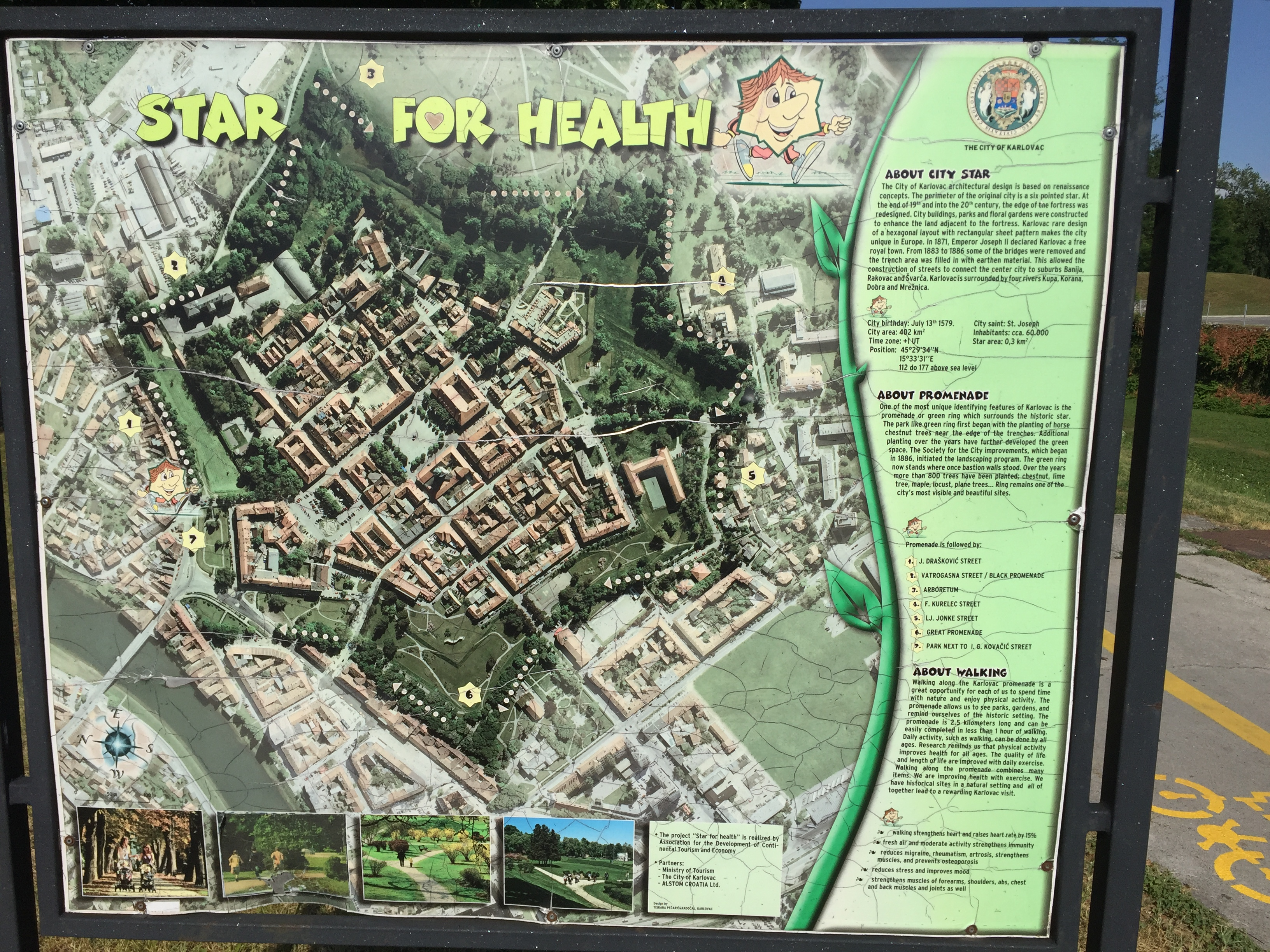 A sétányon kirakott térképes útvonal.